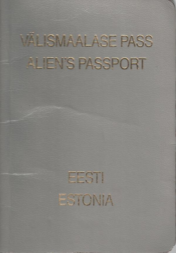 Паспорт иностранца Эстонской Республики